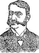 Σκίτσο του Αλέξανδρου Σκουζέ από την εφημερίδα Εμπρός, η οποία δεν κυκλοφορεί σήμερα